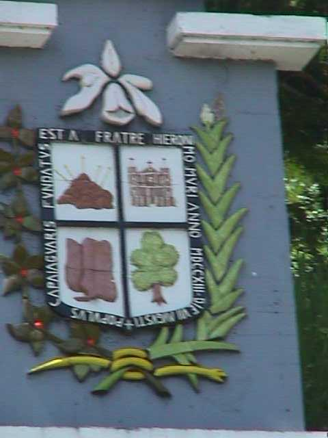 San Antonio de Capayacuar, estado Monagas - Venezuela (1998)